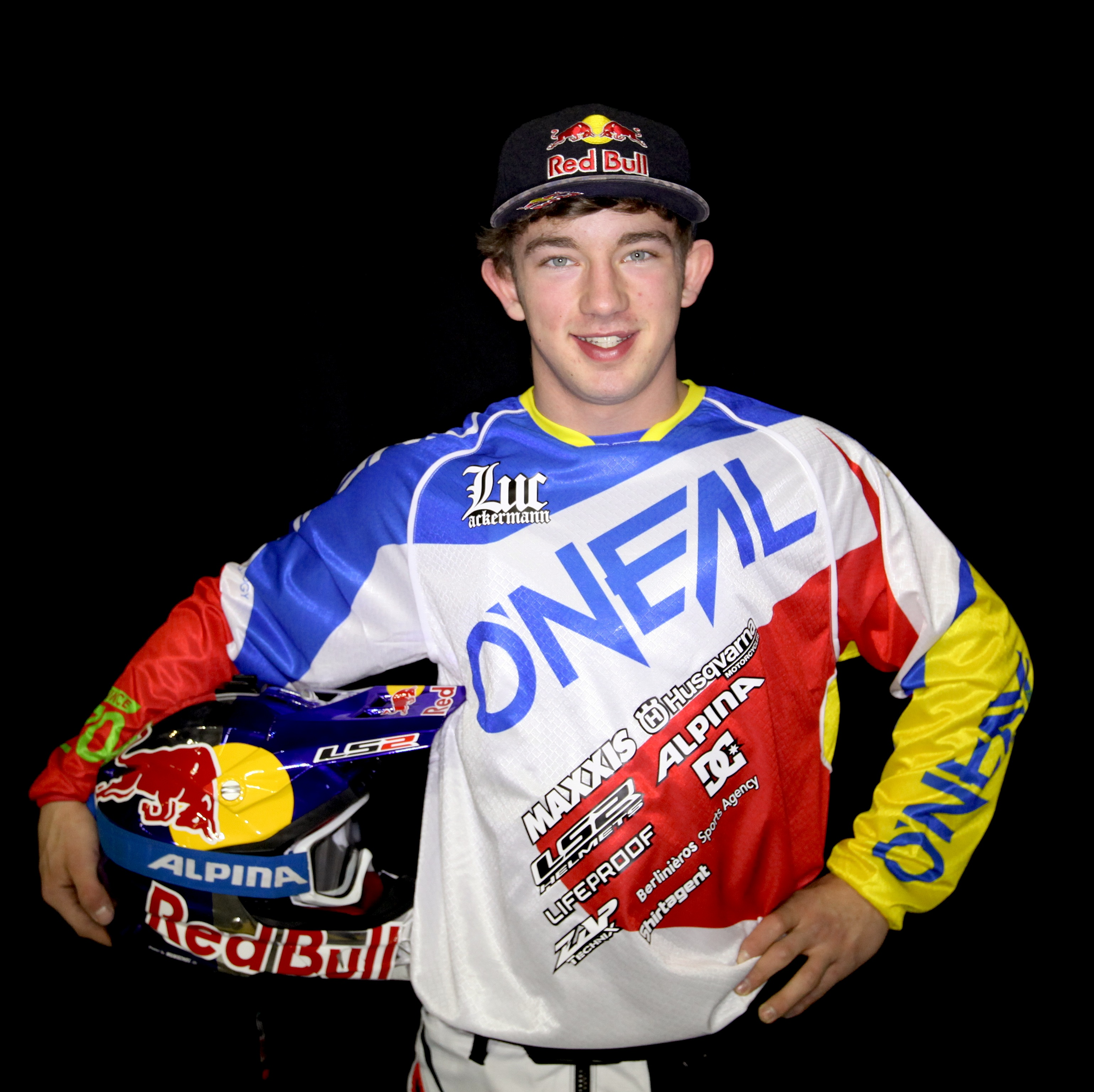 Luc Ackernann,Portrait 2016